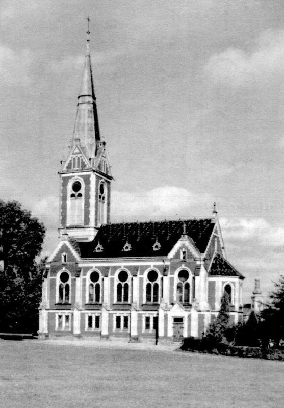 Starokatolický kostel Spasitele v Krásné Lípě